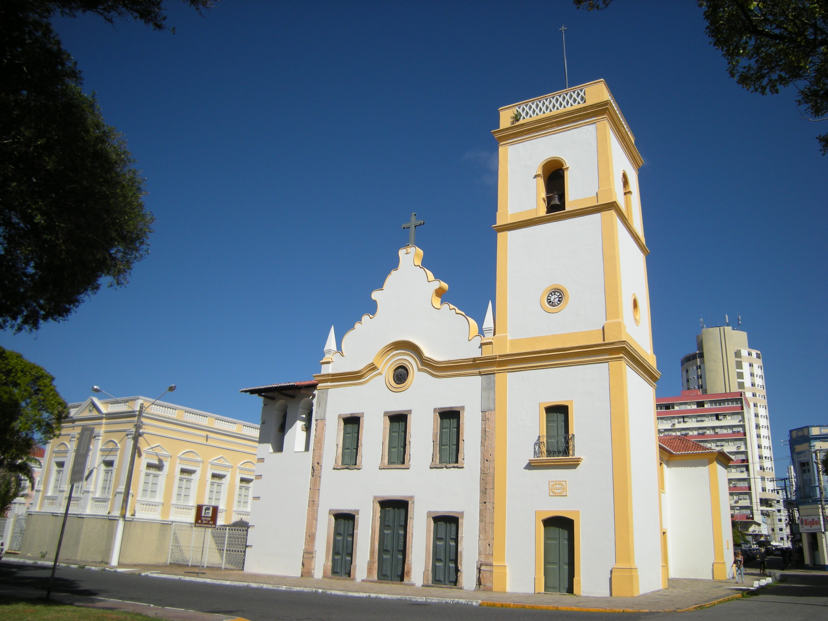 Chiesa della Madonna della Presentazione. Natal (RN), Brazil